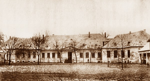 Altes Gutshaus Randau (ca. 1880)